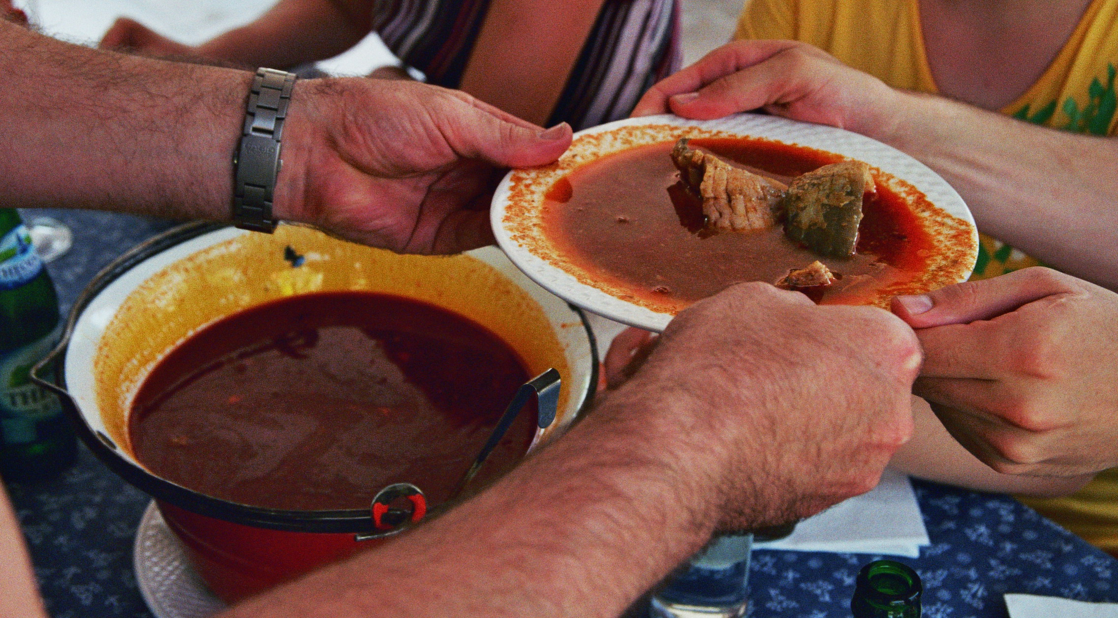 Halászlé - Hungarian Fish Soup in Szeged